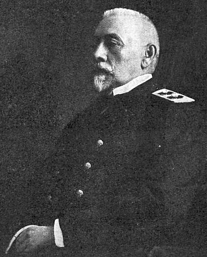 Алексей Алексеевич Бирилев